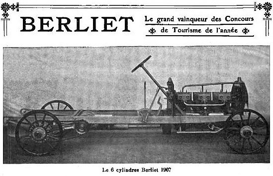 Moteur Berliet 6 cylindres 40 hp de 1907, Histoire de l'automobile, Pierre Souvestre, éd. H. Dunod et E. Pinat, 1907 (ASIN B001BPBE58) p.780